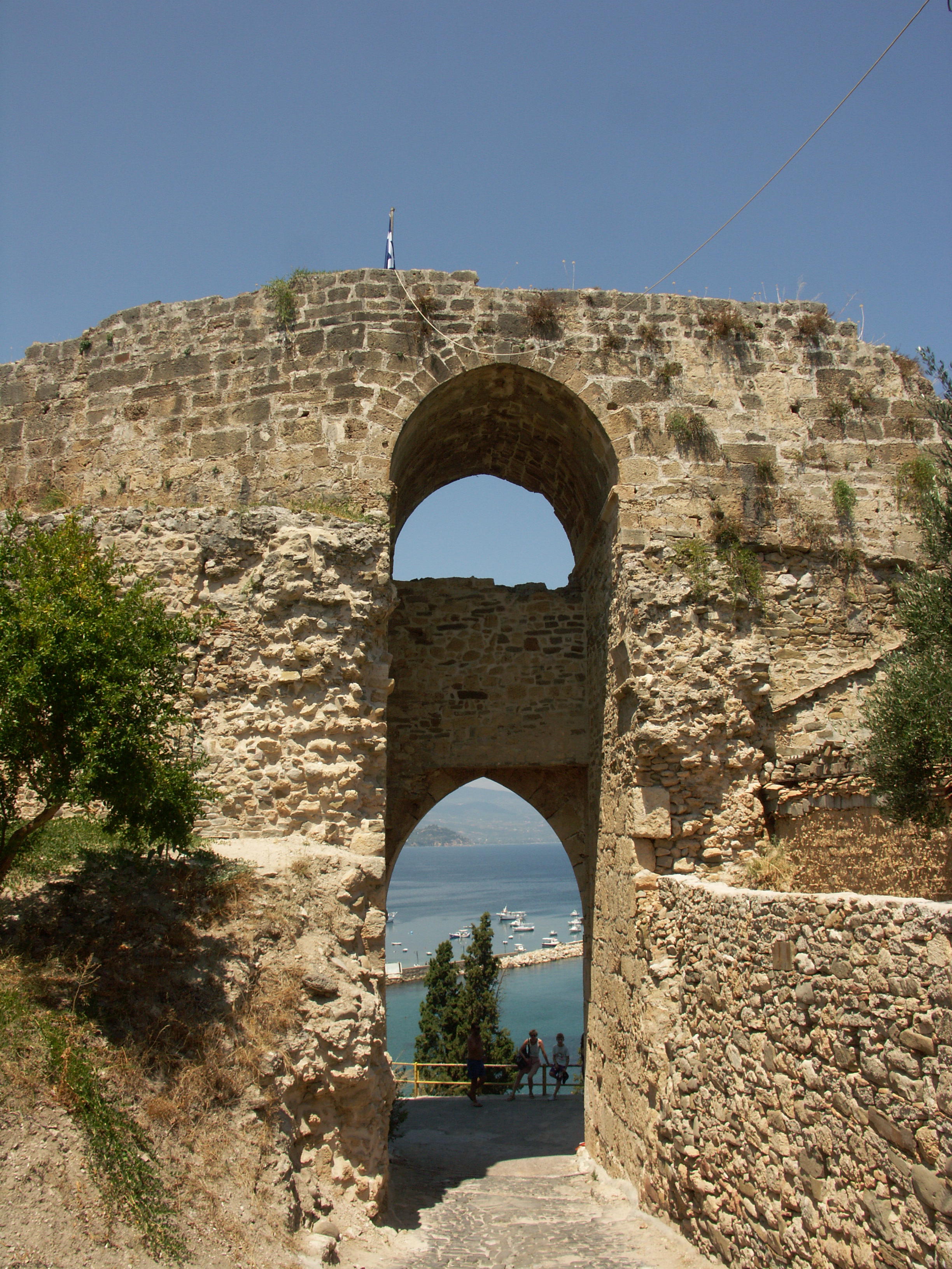 Koroni - Burgtor